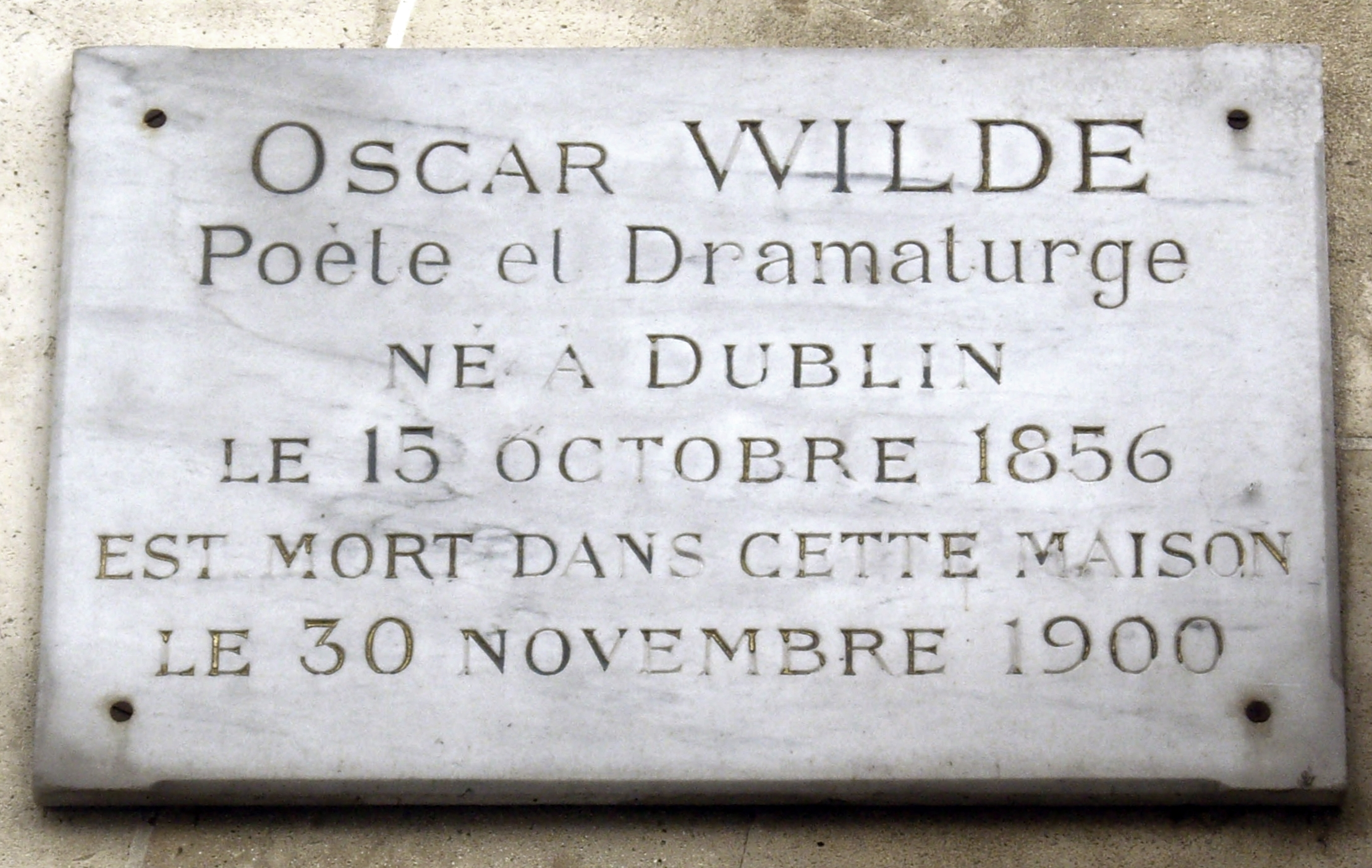 Plaque apposée au n° 13 de la rue des Beaux-Arts, Paris 6e, où mourut Oscar Wilde (1899-1900) le 30 novembre 1900.